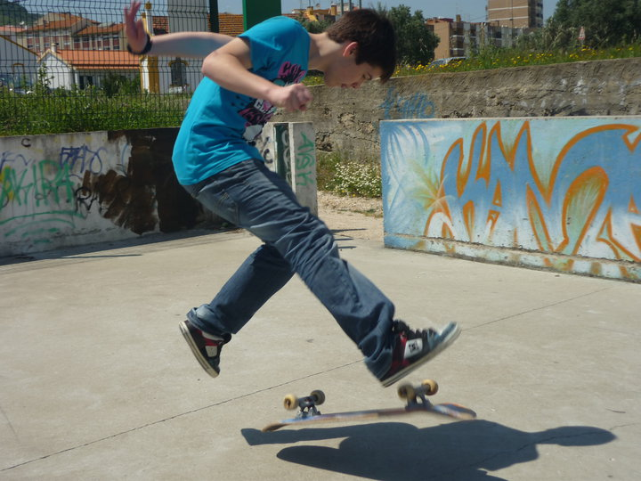 goncalo